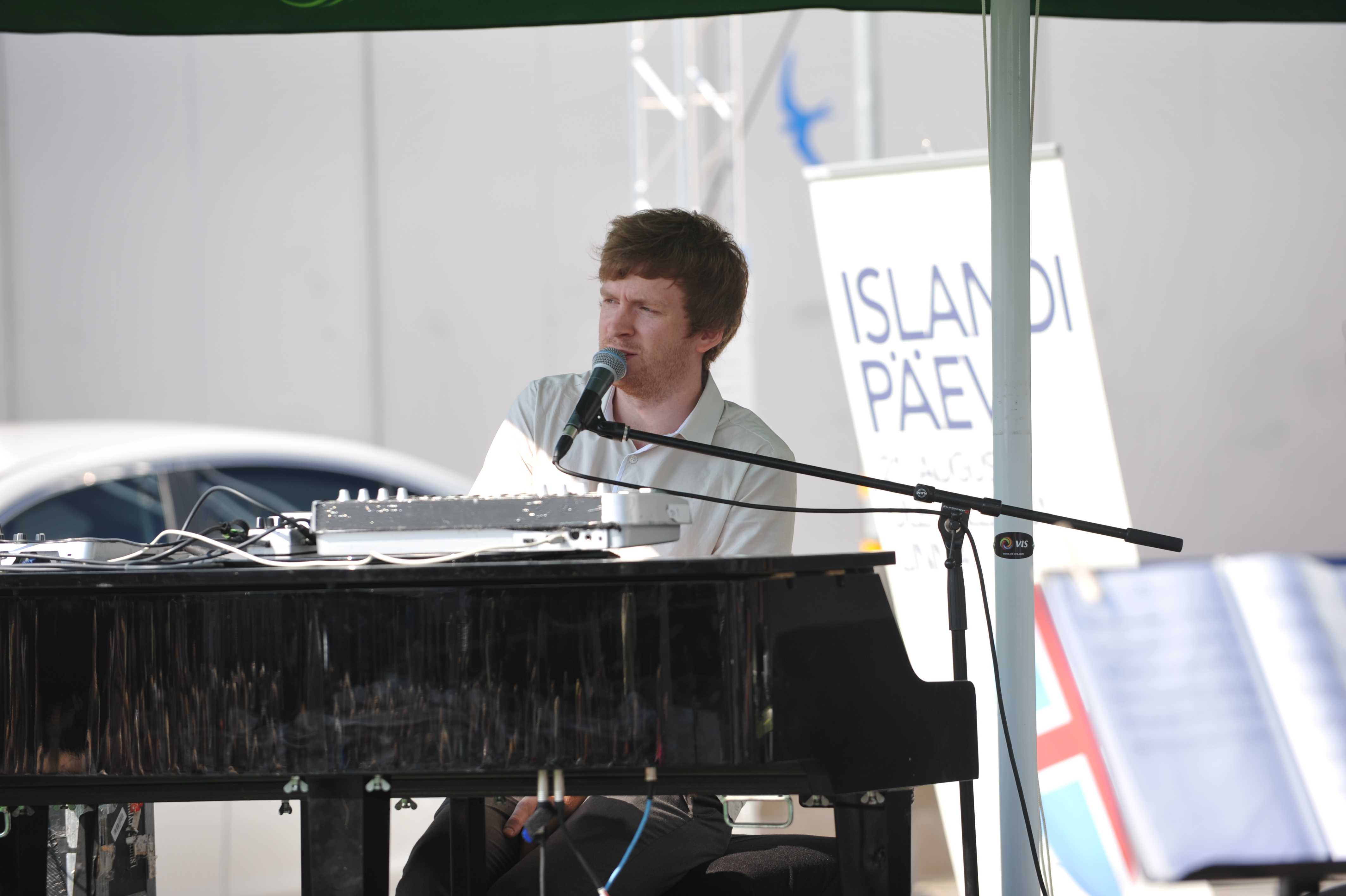 Ólafur Arnalds